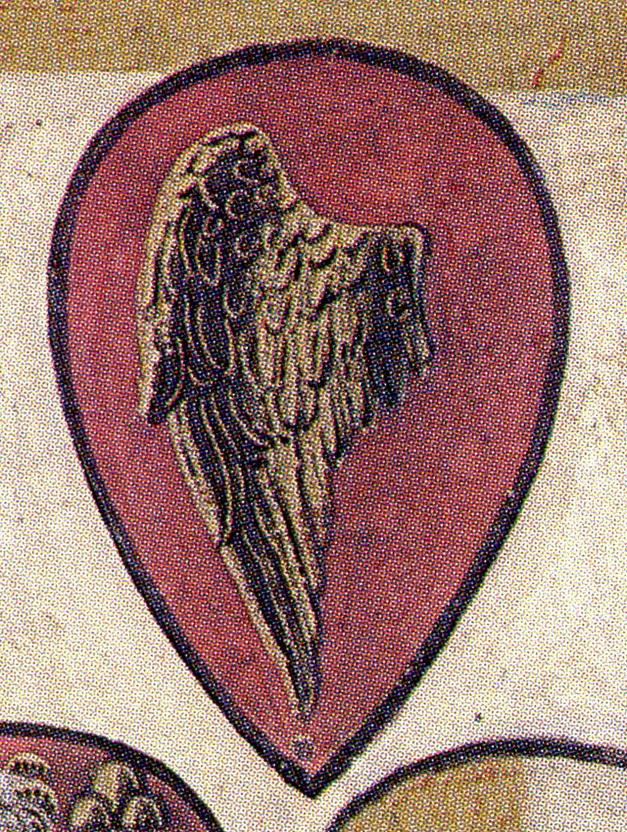 Thumbnail Arme Guelfi (flying down) tablet Biccherna (detail)